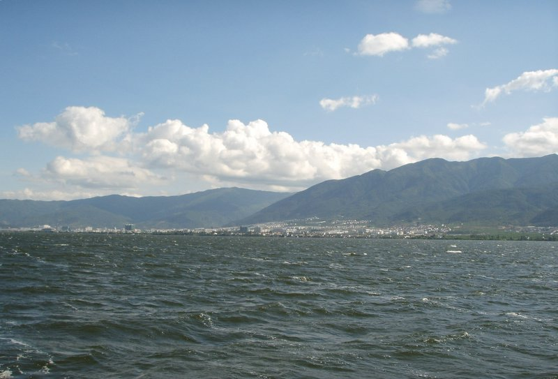 苍山洱海